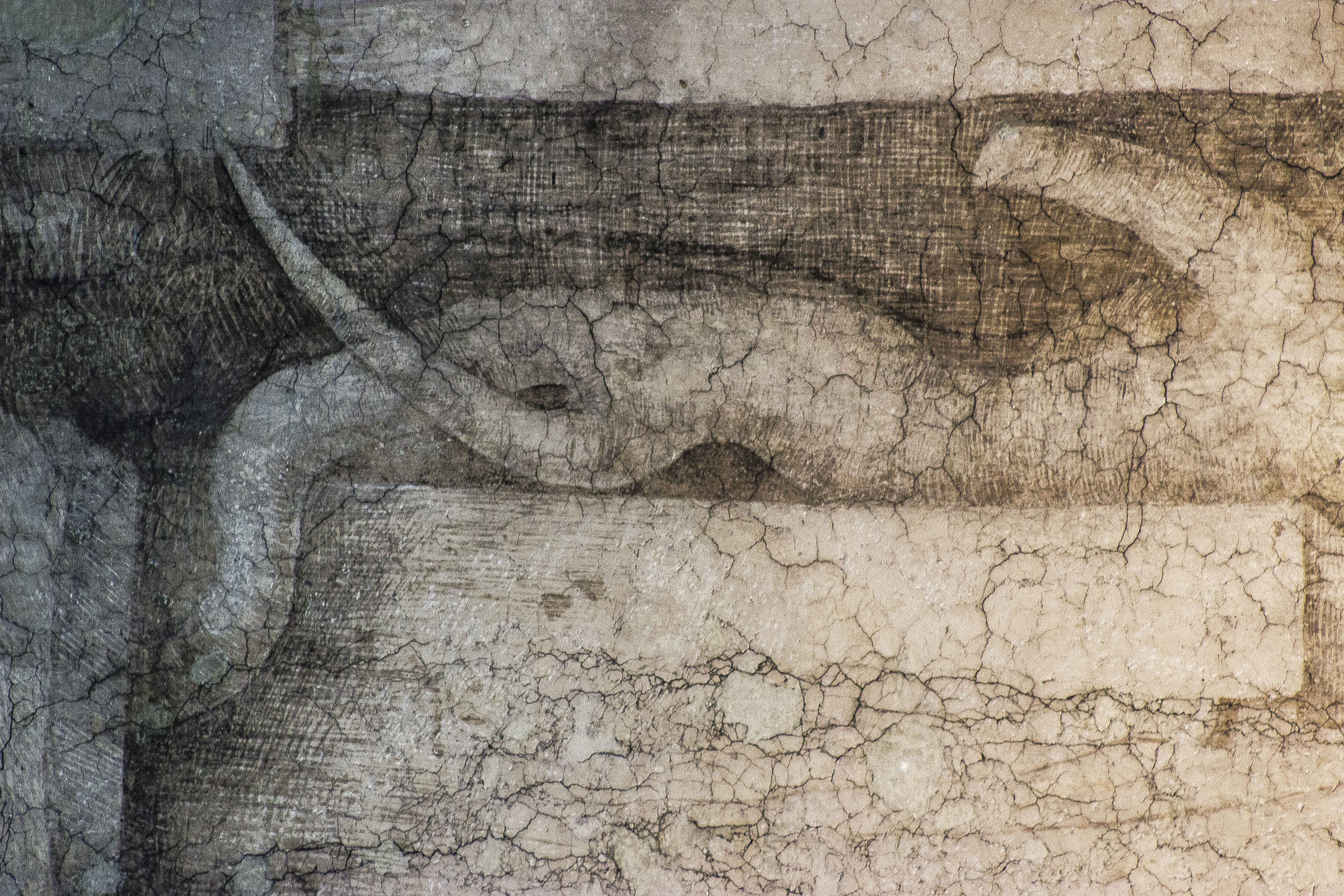 Dettaglio del monocromo riscoperto nella Sala delle Asse